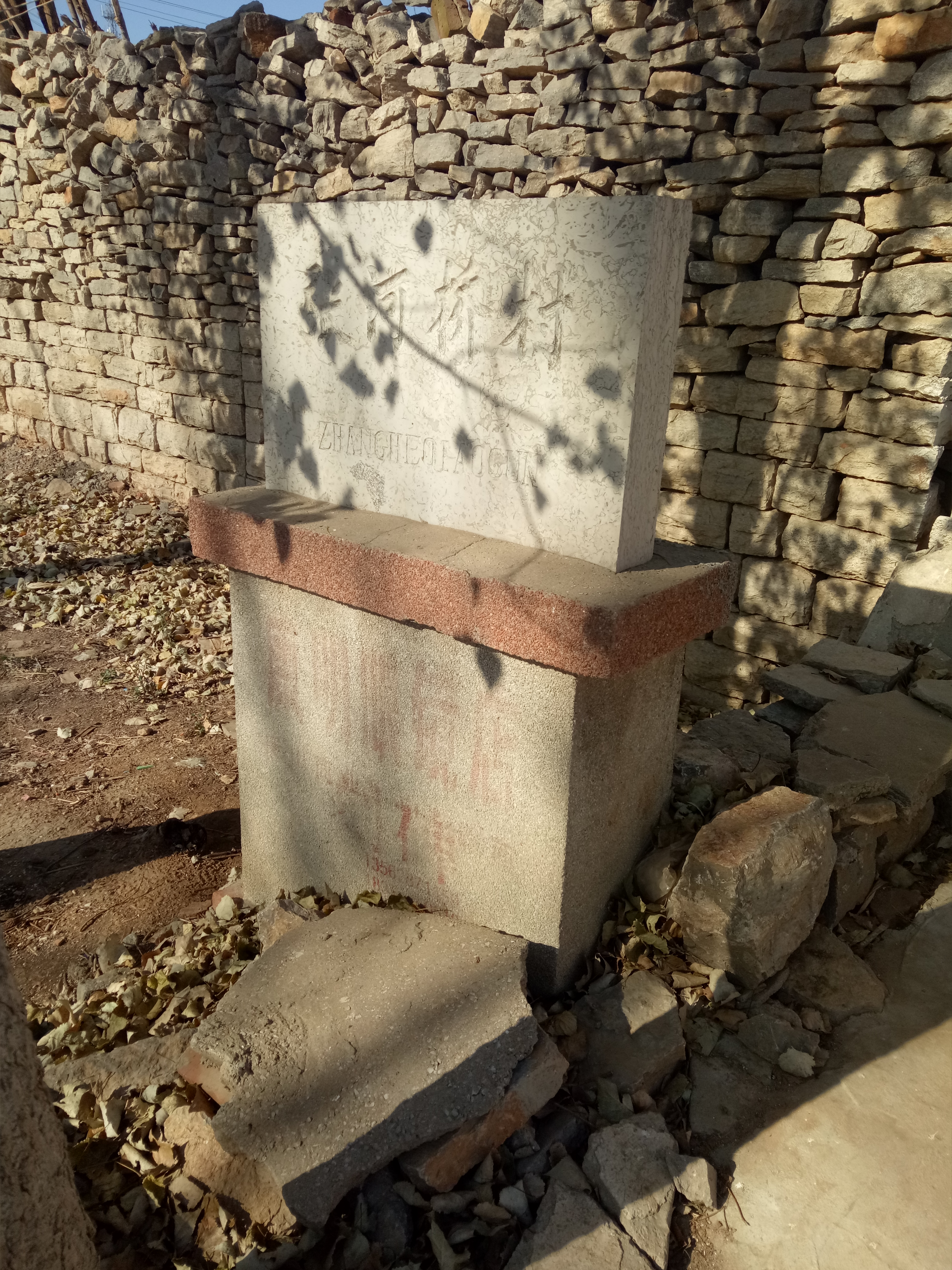 接山镇张河桥村